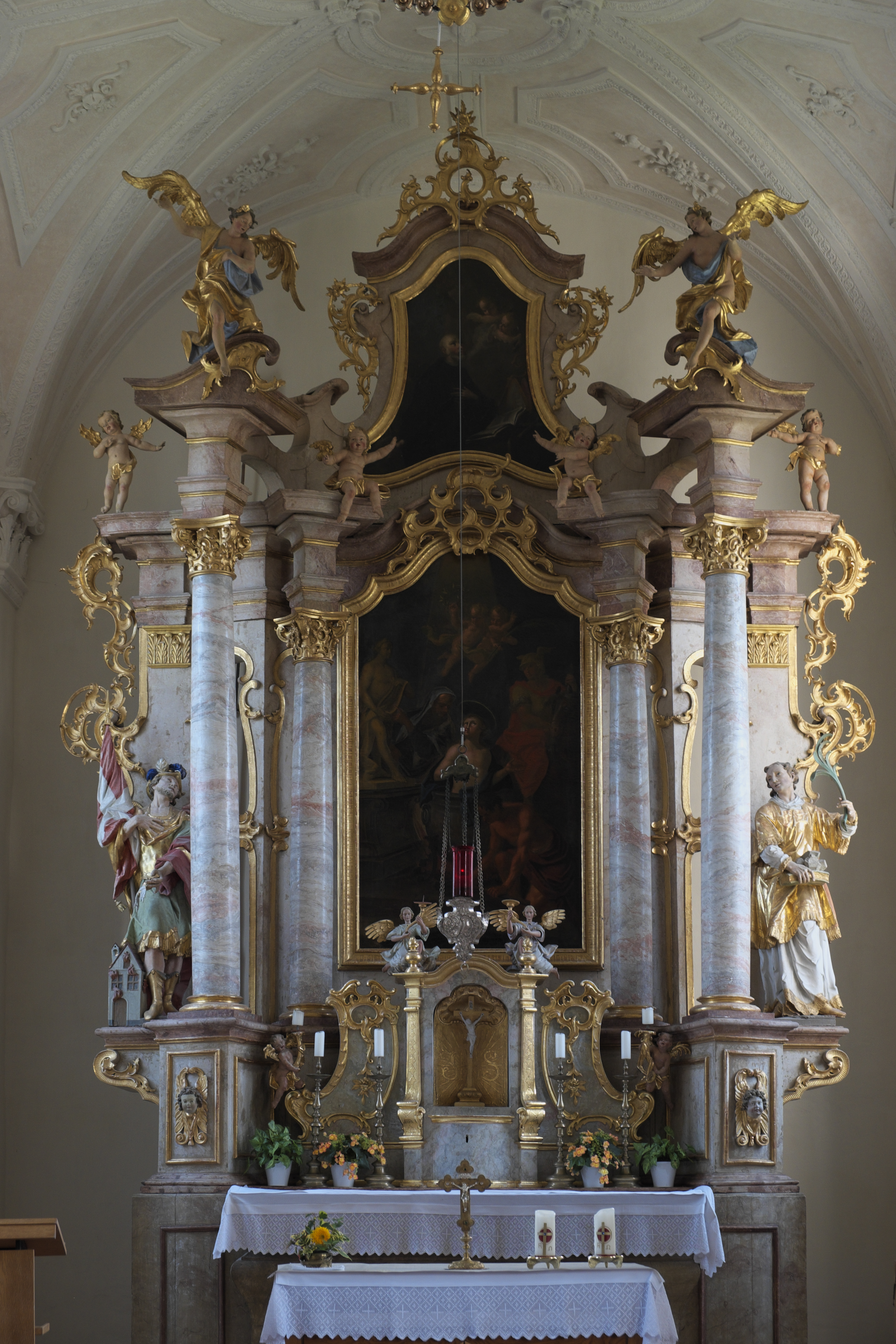 Katholische Filialkirche St. Vitus in Grucking (Fraunberg) im Landkreis Erding (Bayern/Deutschland), Hochaltar, um 1770